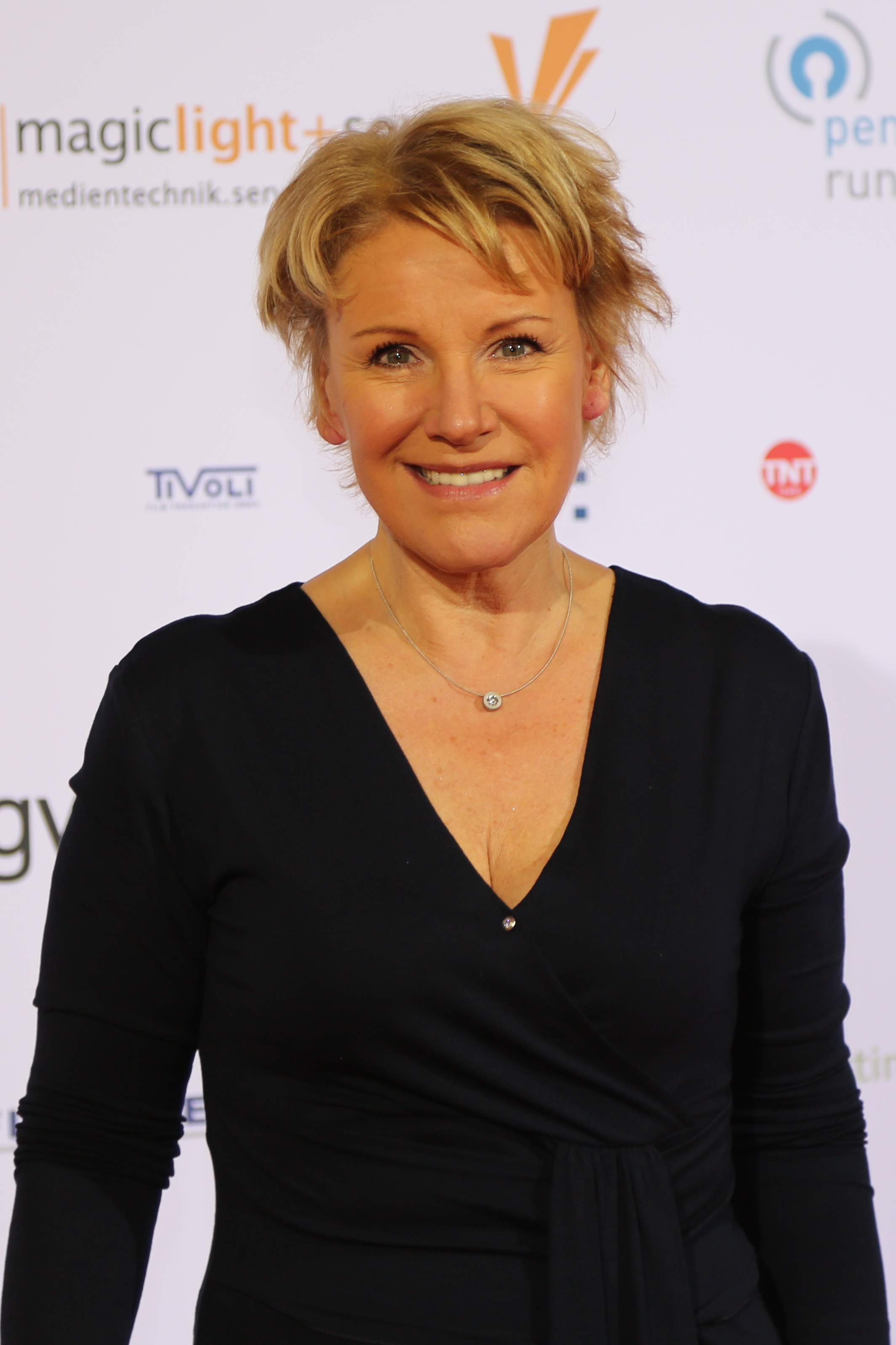 Mariele Millowitsch bei der Verleihung der Auszeichnungen der Deutschen Akademie für Fernsehen (DAFF) 2017.